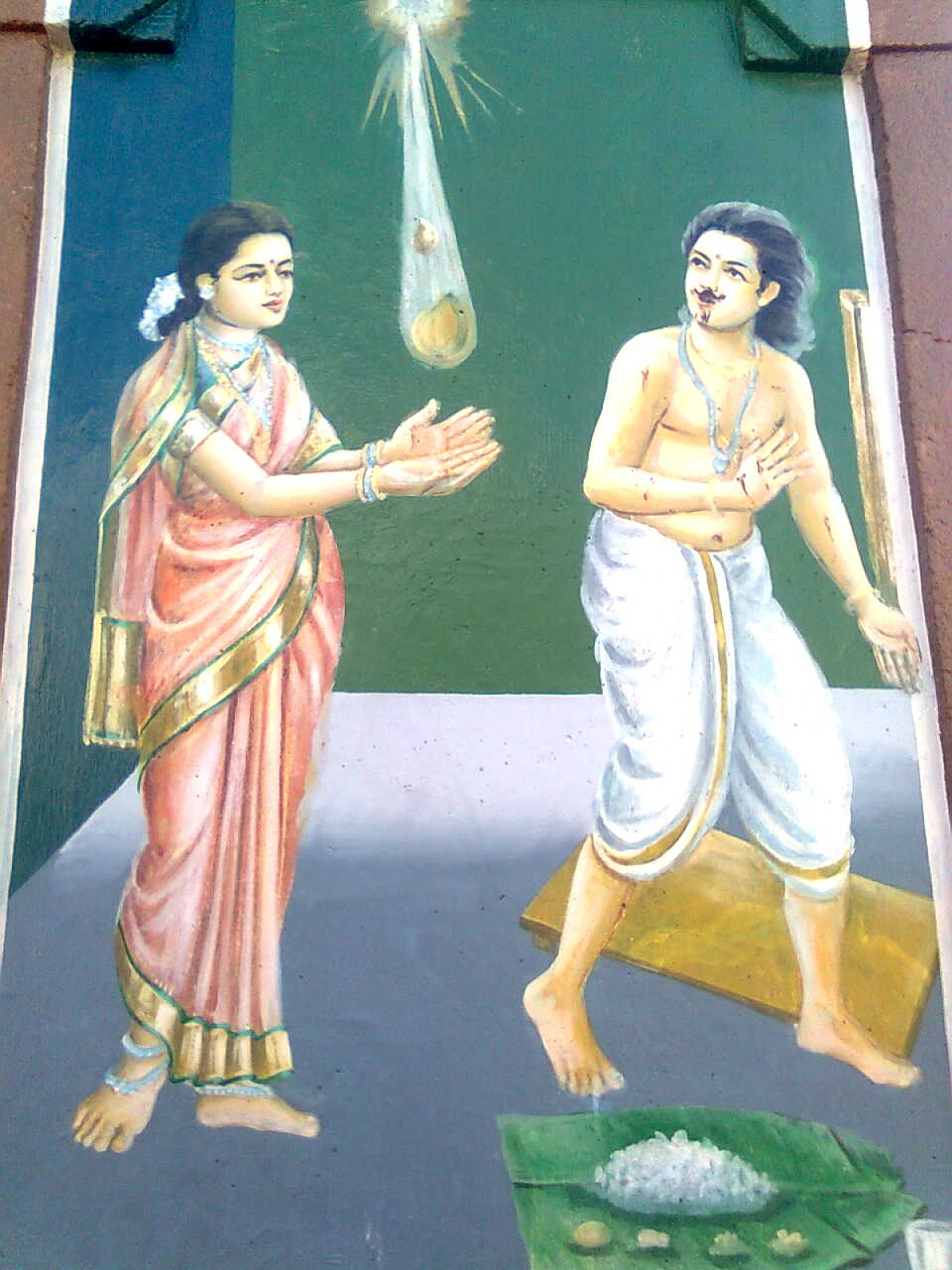 காரைக்கால் அம்மையார் கோயில் சுவர் ஓவியம்